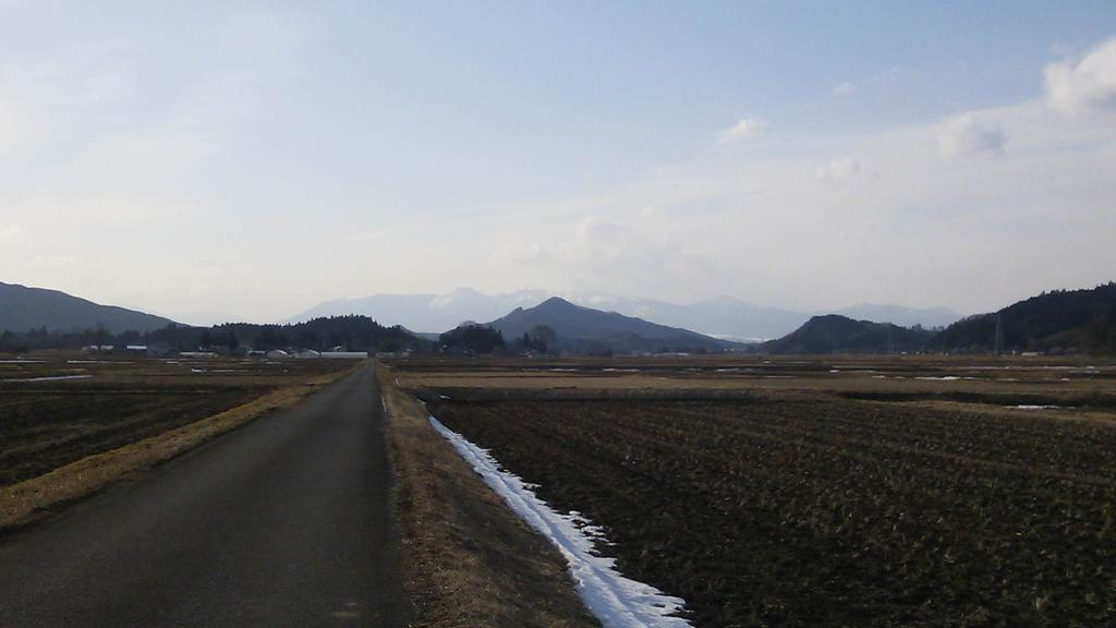 関山（白河市表郷）